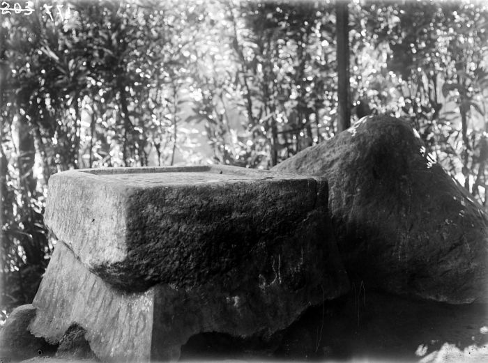 Negatief. Megaliet bij Tjoeroep